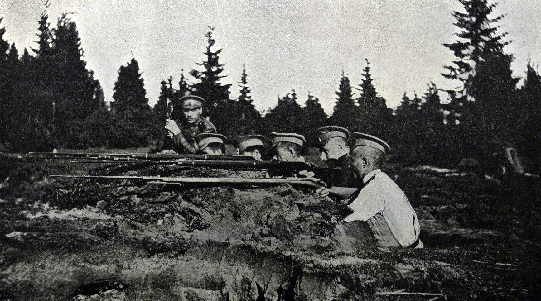 «В окопах» // Великая война в образах и картинах : [в 14 вып.] / под ред. Ив. Лазаревского. — М.: Издание Д. Я. Маковского, 1914-1917 (Товарищество типографии А. И. Мамонтова); [Вып. 9]. — 1916.